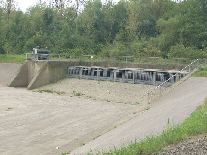 Ab- und Einlaufbauwerk eines Regenrückhaltebeckens - selbst fotografiert im September 2005 (der greg:) 10.9.2005